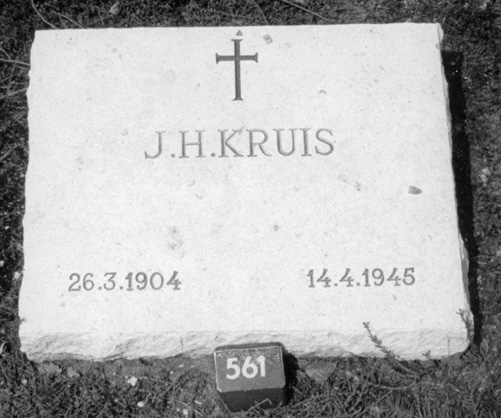 Definitief graf van Jan Kruis op het militair ereveld te Loenen.